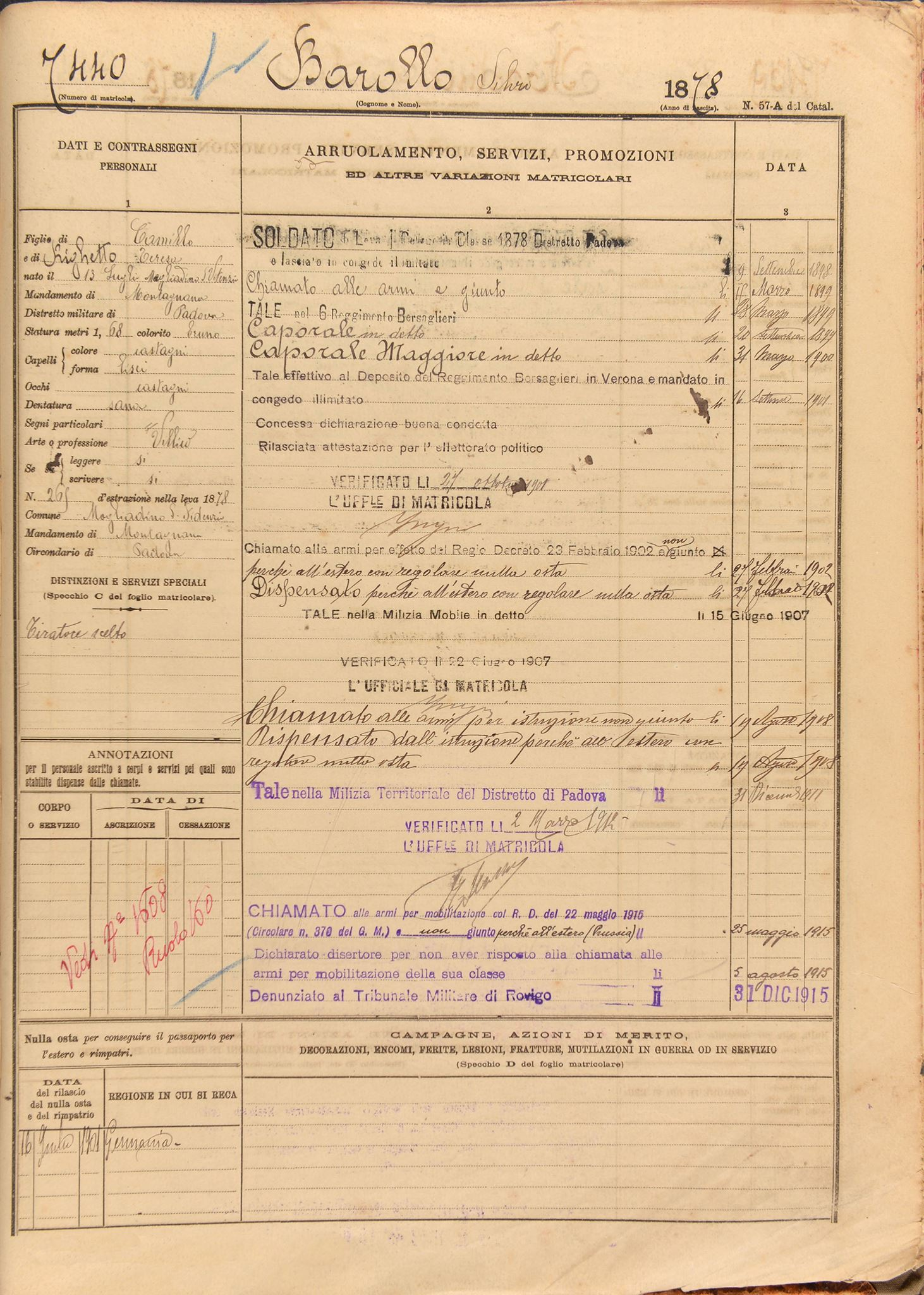 Foglio matricolare esercito italiano